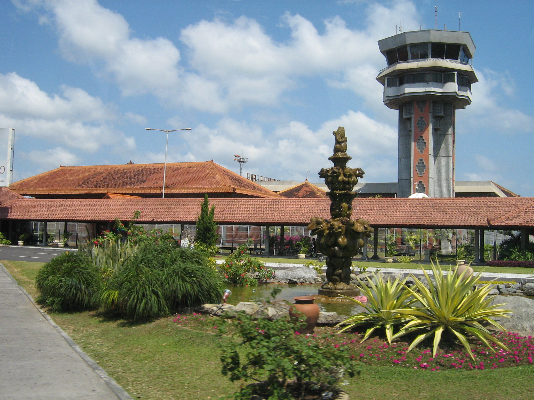 Tower vom Denpasar Ngurah Rai International Airport